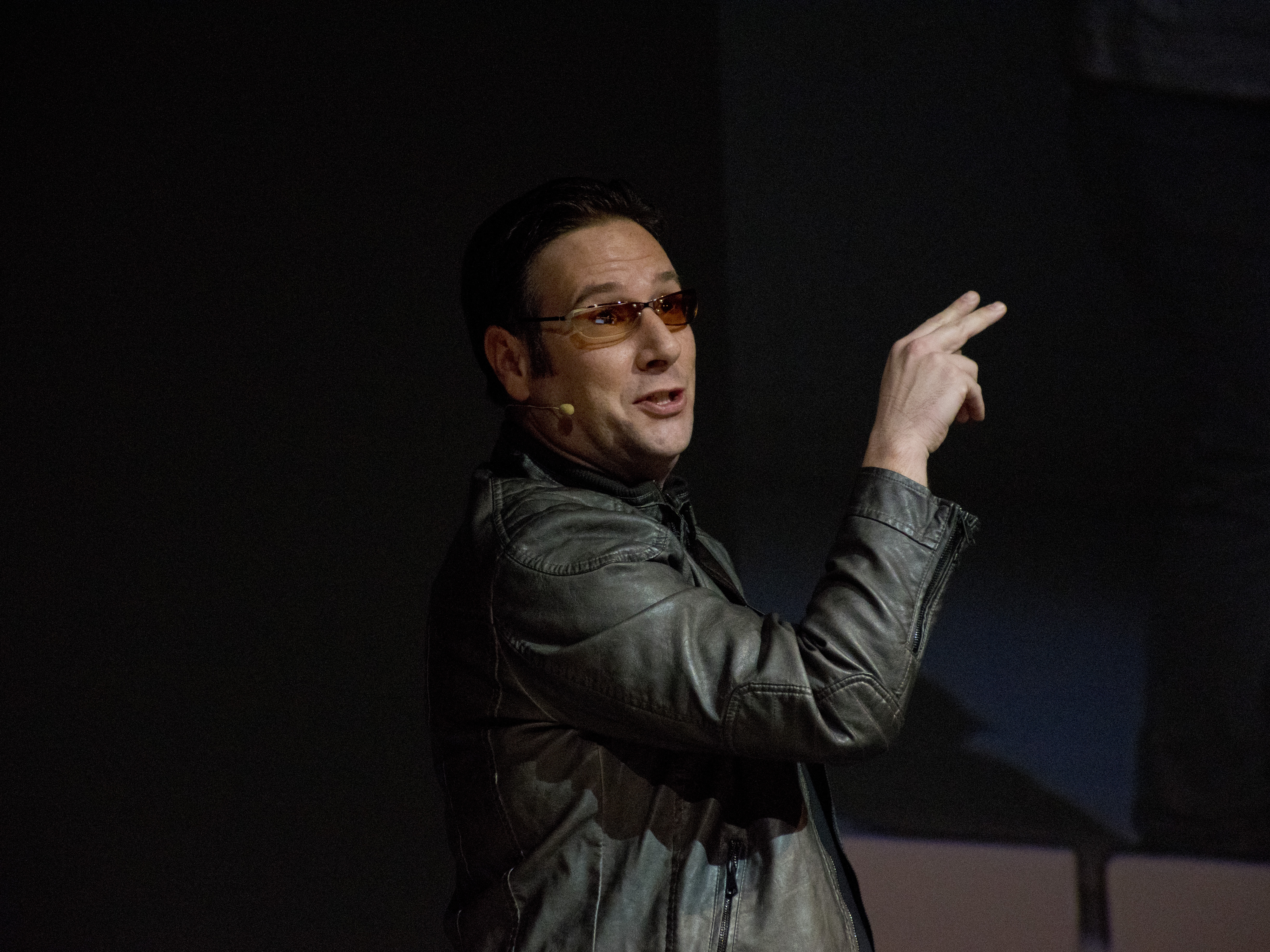 Carlos Latre, en novembre de 2015.